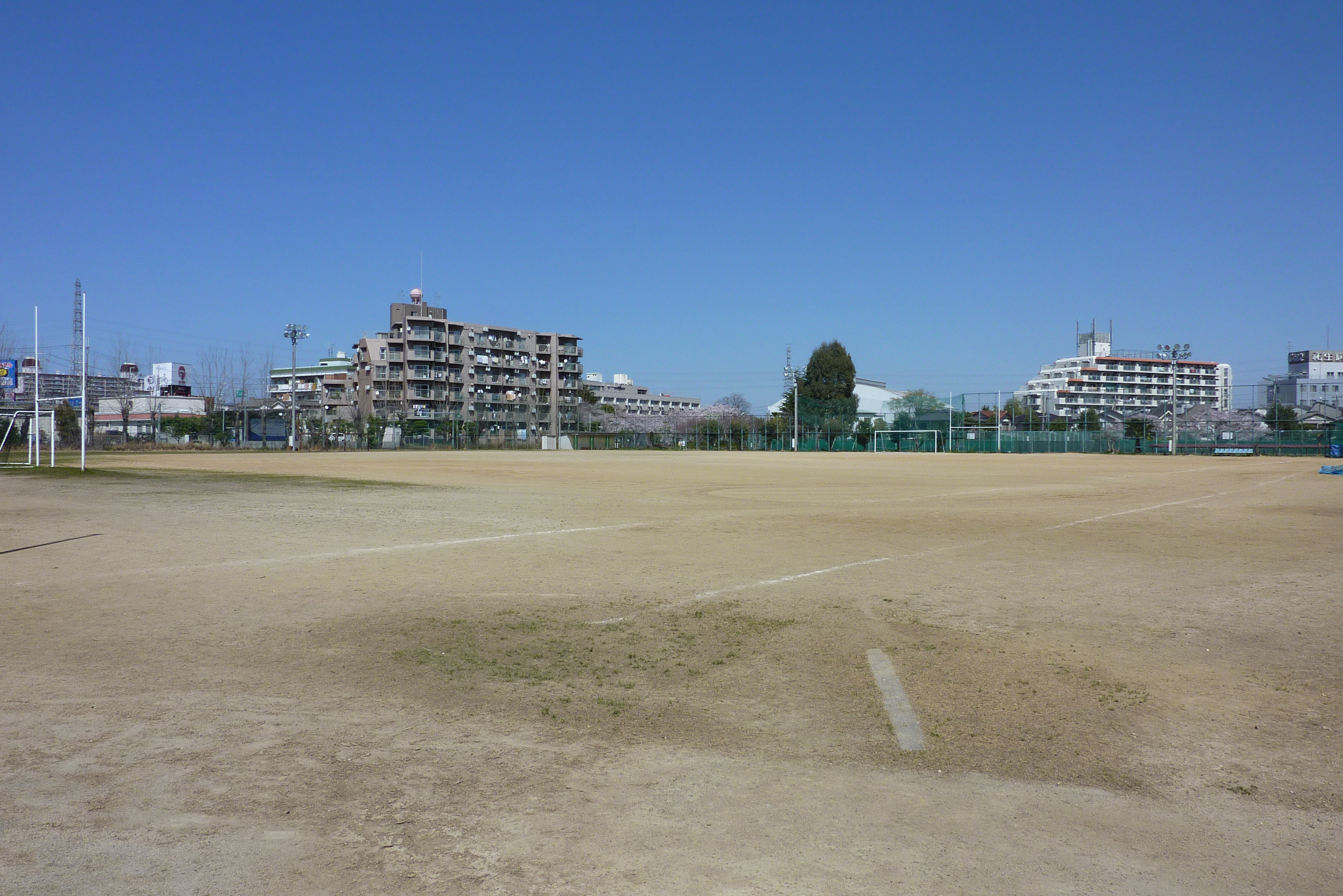 産業技術短期大学運動場